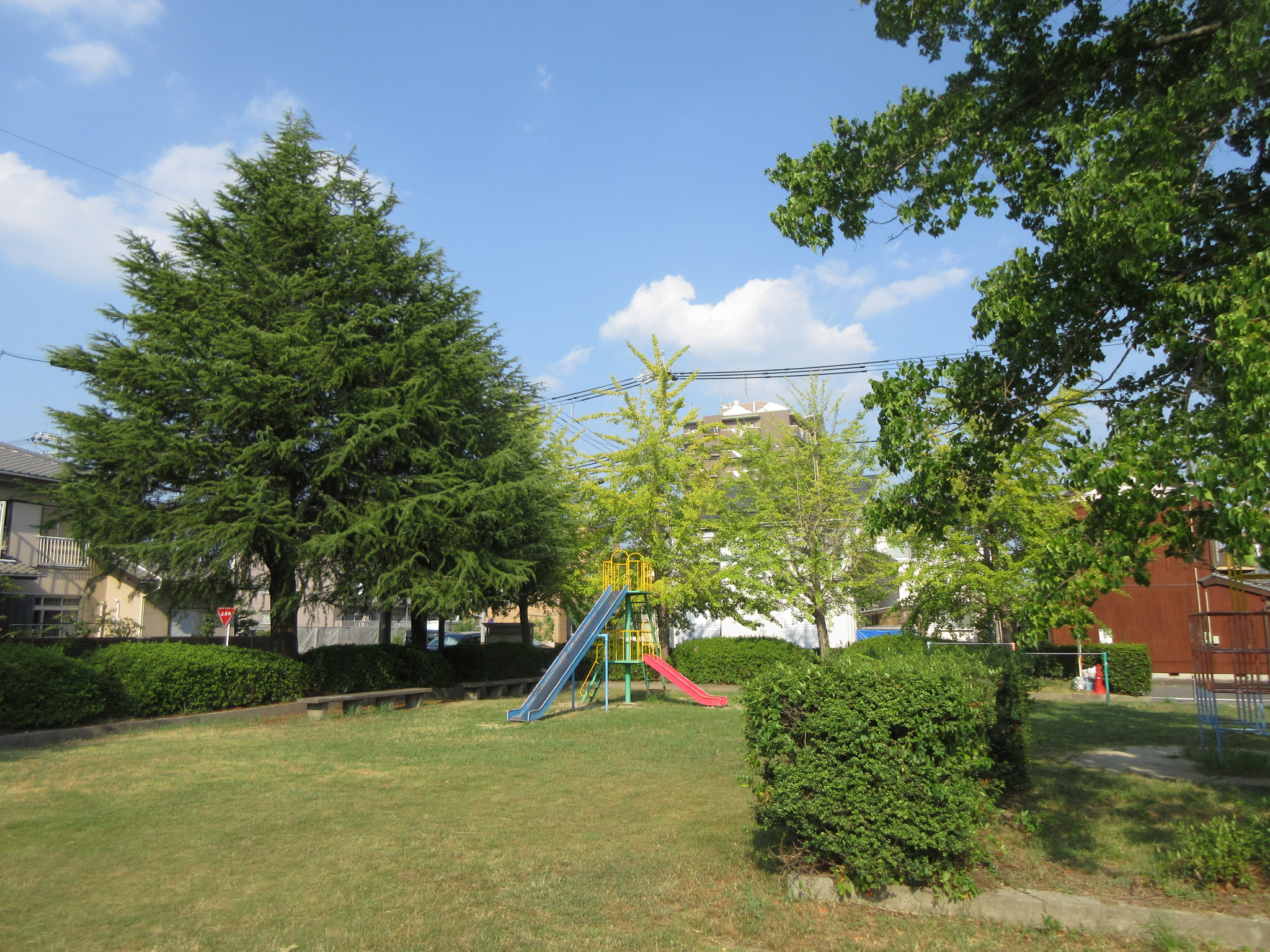 日名中公園（岡崎市日名中町）